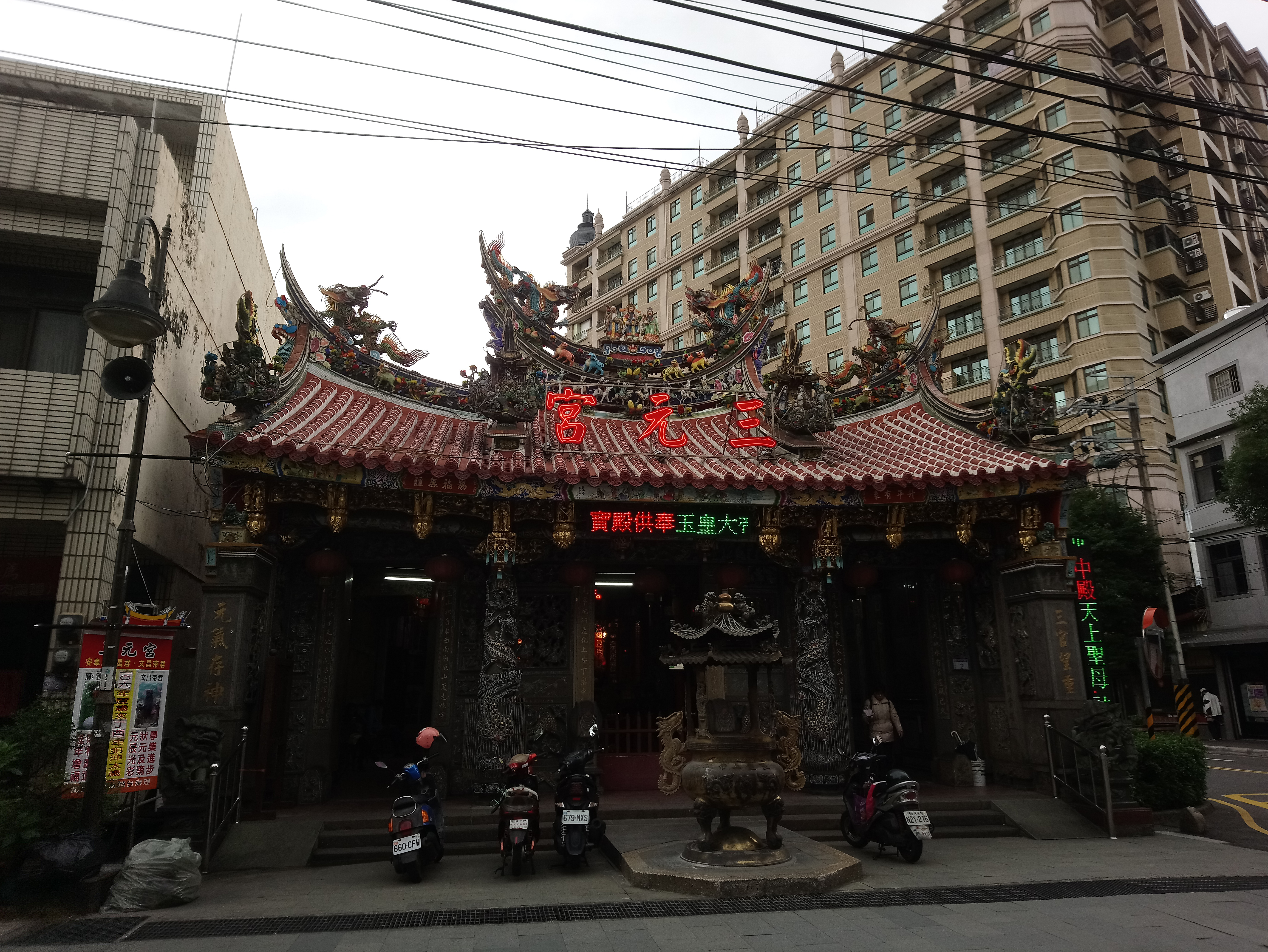 八德三元宮,桃園市八德區興仁里